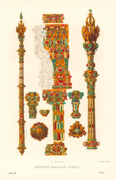 Скипетр большого наряда Древний скипетр большого наряда, хранящийся в Оружейной палате, в описи Государева большого наряда, составленной в 1642 г. по указу царя и великого князя Михаила Федоровича, описан следующим образом: «Скипетр золот чеканной с розными финифты и с каменьи, с алмазы и с яхонты червчатыми и с изумруды; наверху три орла пластанных крылами вместе, с финифты; по верху орлов корона, на короне на спне камень яхонт лазорев, на нем зерно гурмицкое. Со скипетра снят яхонт лазорев, а в то место положен изумруд». После замены лазоревого яхонта изумрудом этот скипетр большого наряда, как видно из последующих описей, сохранился в том же виде по настоящее время. О нем же упоминается в описи казны и царского наряда царя Иоанна Алексеевича: «Скипетр золот с розными финифты, на нем орел с короною, на короне изумруд; сверху и на исподе того изумруда по зерну гурмицкому; в нем двадцать алмазов, девять яхонтов червчатых, три изумруда; одного алмаза нет; влагалище оклеено бархатом алым, посредине атласом червчатым». При общем царствовании царей и великих князей Иоанна и Петра Алексеевичей этот скипетр принадлежал Иоанну. А для царя Петра Алексеевича сделан был сходный с ним скипетр, золотой с цветною финифтью и также украшенный изумрудом большим, на спне, с двумя бурмицкими зернами, тремя малыми изумрудами, двадцатью алмазами и девятью яхонтами. Древности Российского государства (Antiquities of Russian country), 1846—1853. Т.2. Иллюстратор :Солнцев, Фёдор Григорьевич.